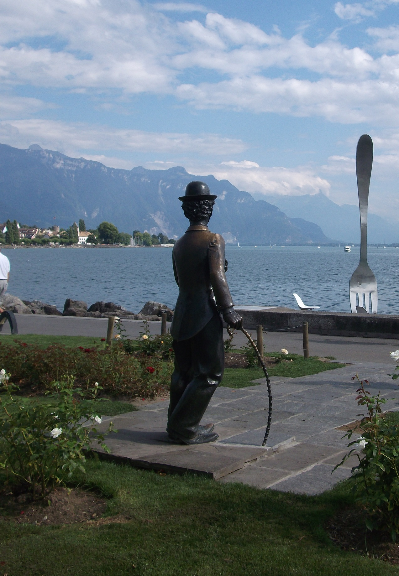 Charlie Chaplin's statue on the promenade in Vevey